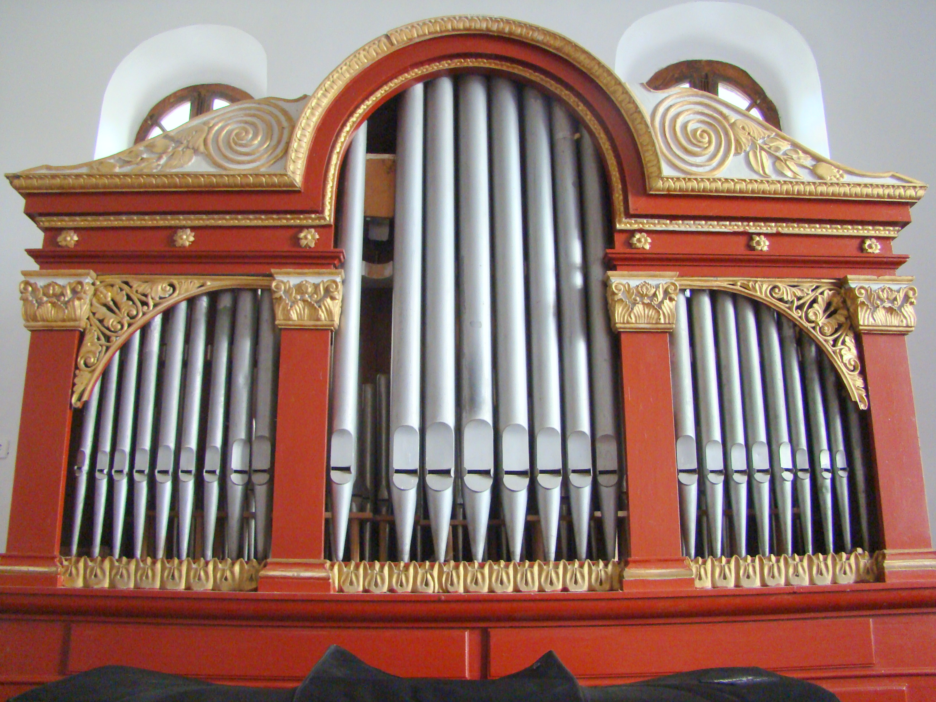 Biserica reformată, sat Belin; comuna Belin 612 1770 (biserica), 1911 (turn)